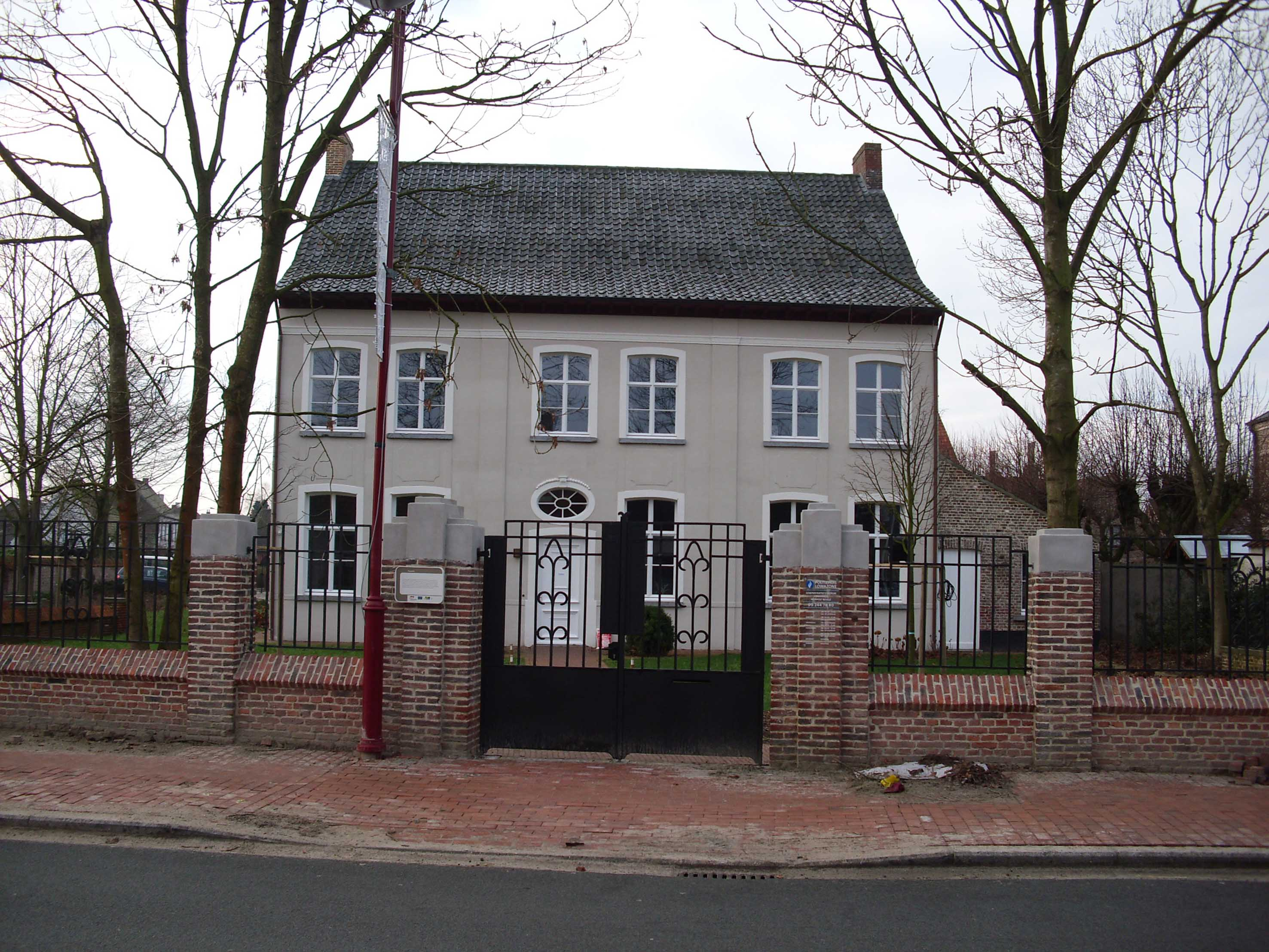 Pastorie van Hansbeke uit 1847 - Nevele - Oost-Vlaanderen - Vlaanderen - België. Na restauratie (2009) nam de politie Lowazone (Lovendegem, Waarschoot, Zomergem en Nevele) er haar intrek.